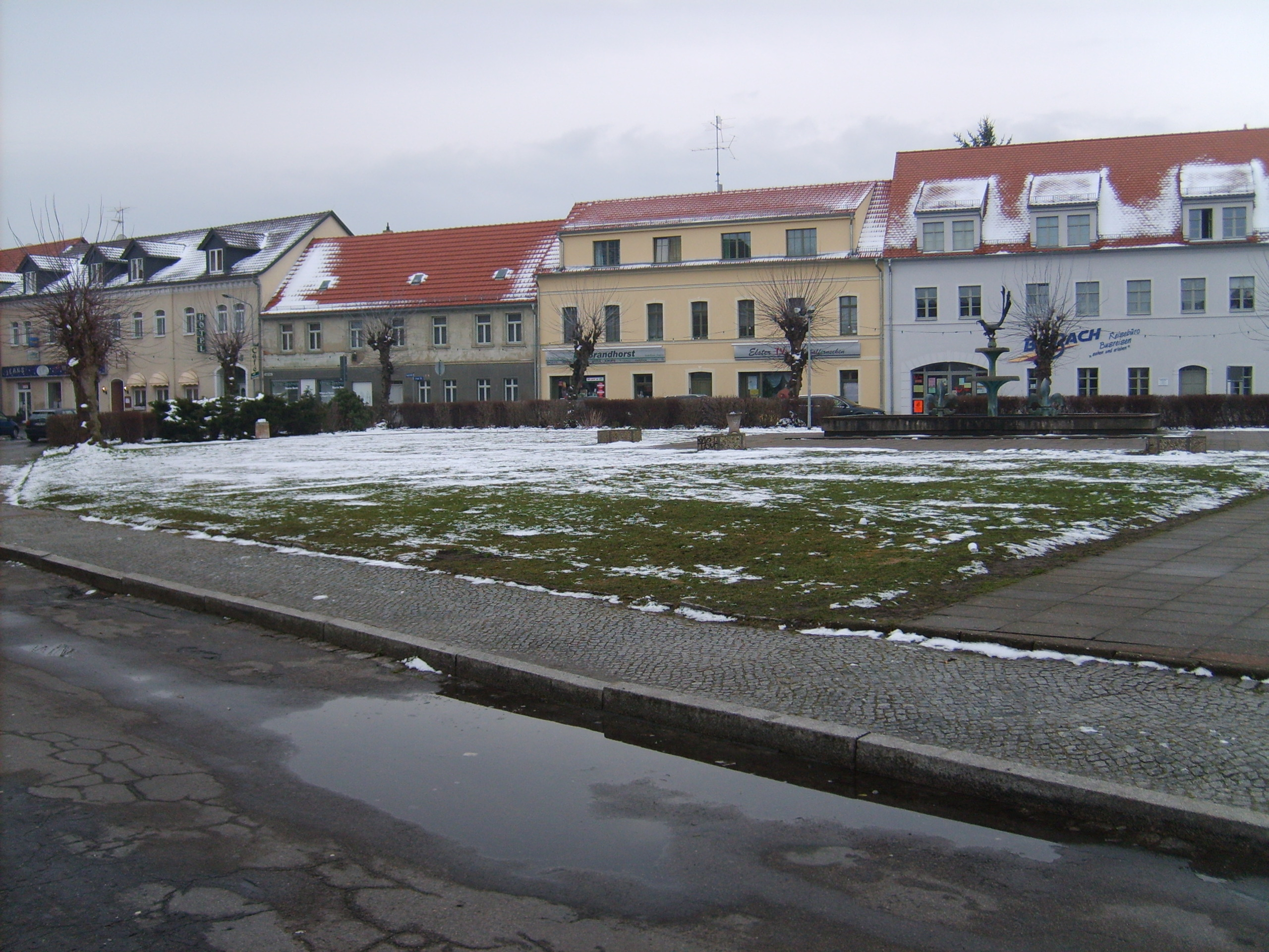 Elsterbrunnen im Winter 2006/2007 (2007 abgerissen)